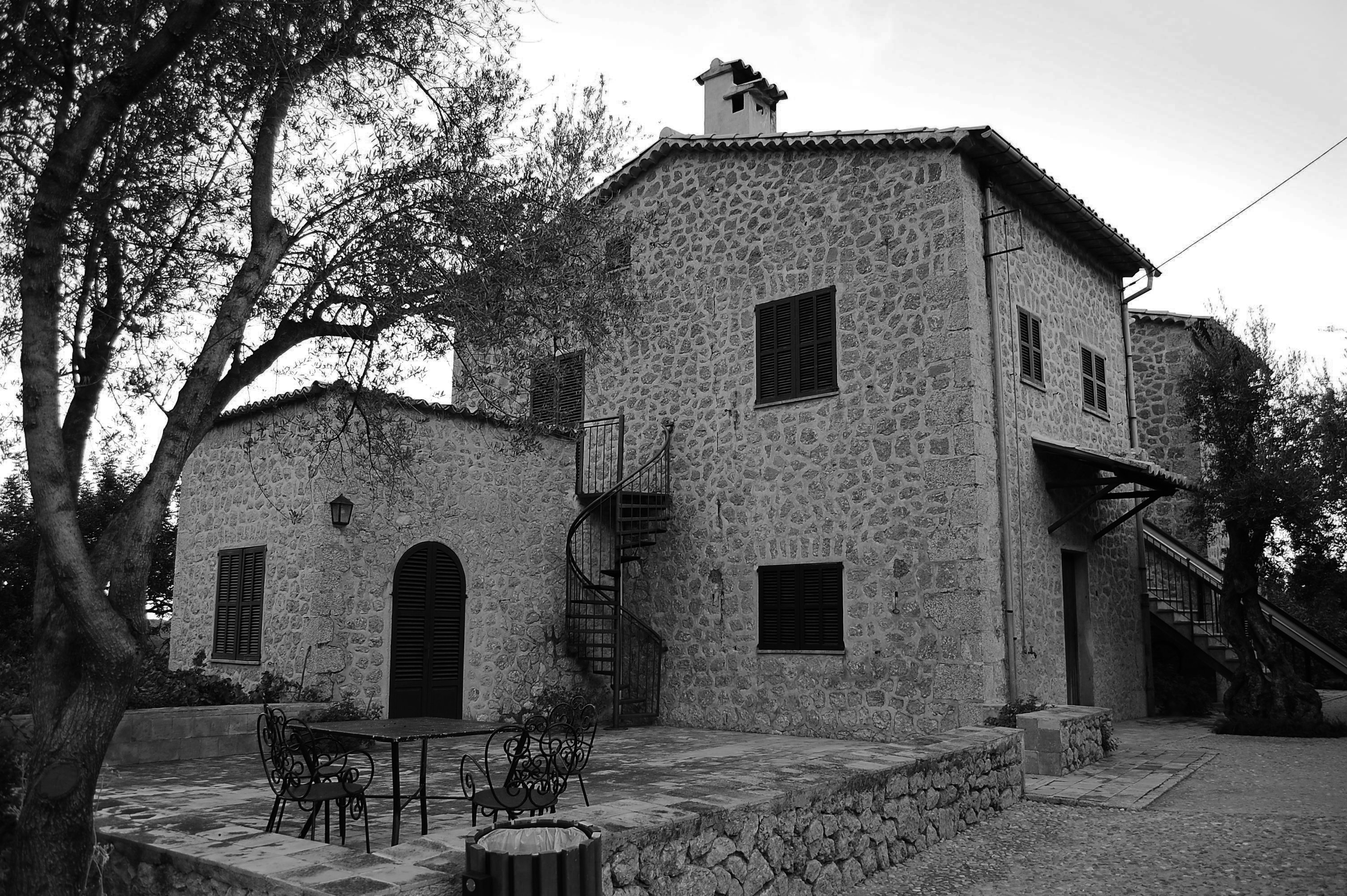 home in Deiá.